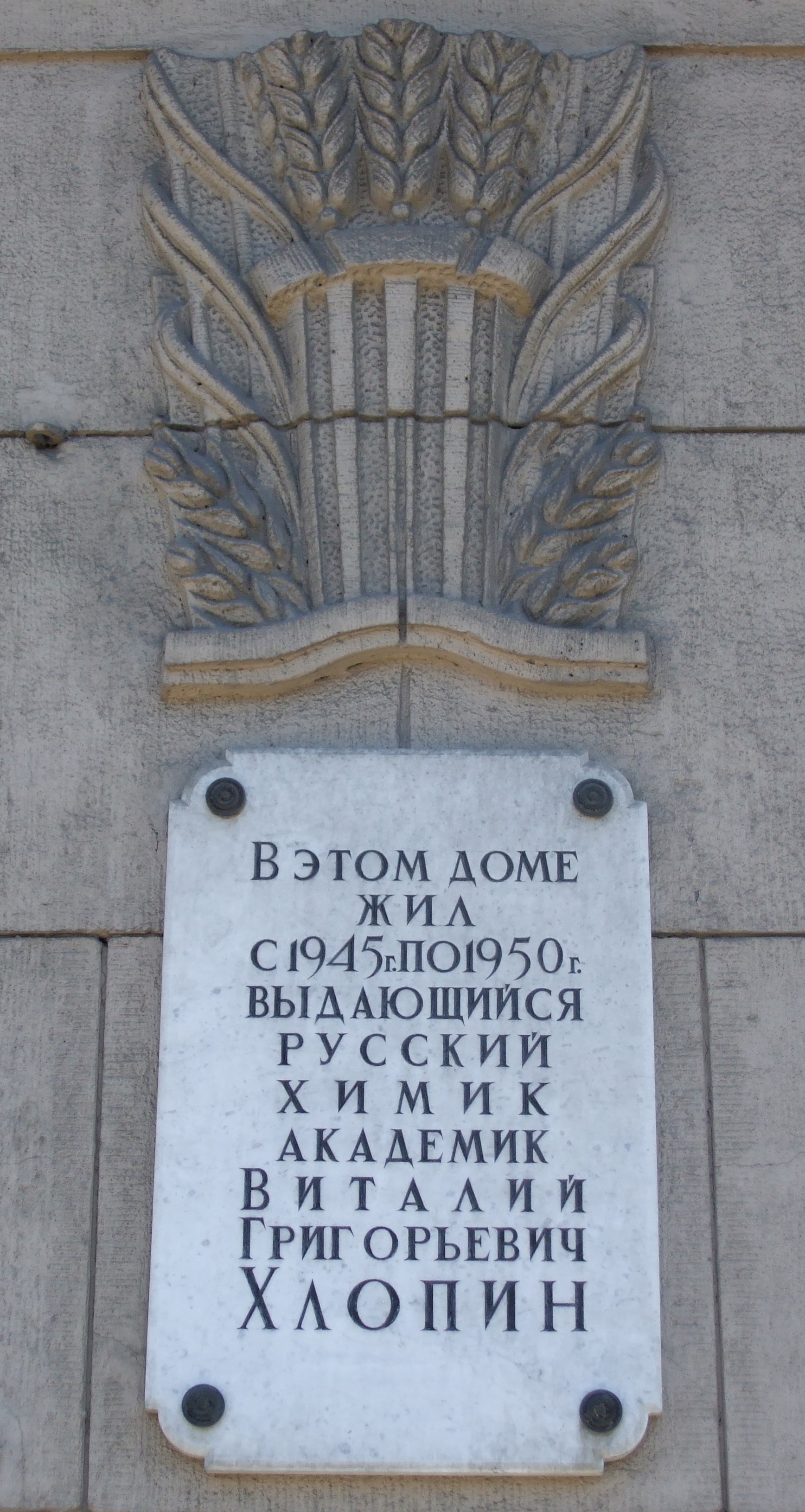 Мемориальная доска, Лесной проспект, Санкт-Петербург